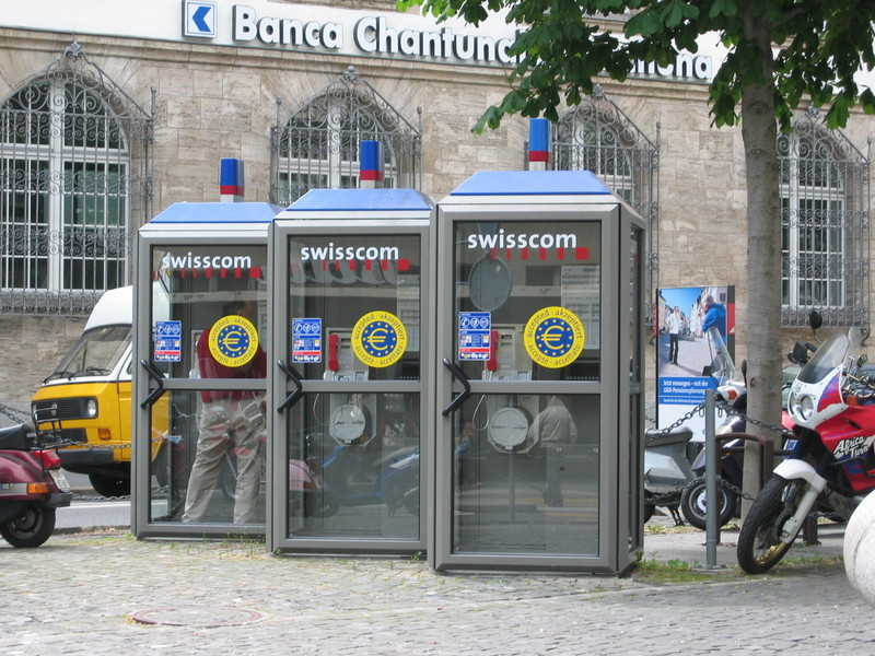 Drei Swisscom-Telefonzellen in Chur